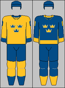 Swedish national team jerseys from World Cup of Hockey 2016 ... Big thanks to Realismadder for a large share on these jerseys.